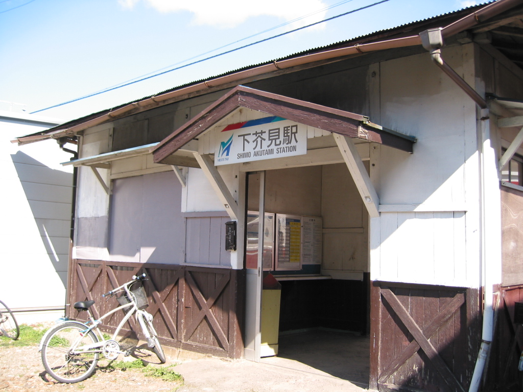 名鉄 下芥見駅舎（2005年2月撮影）